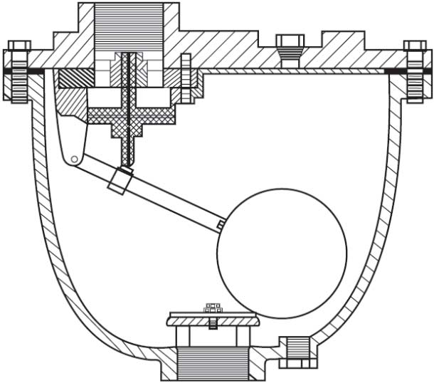 احد انواع الصممات ويدعى صمام إدخال الهواء وإخراجه